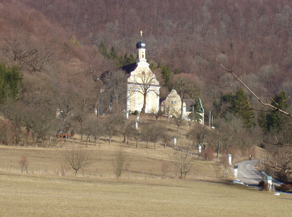 Wallfahrtskirche "Ave Maria" in Bad Ditzenbach